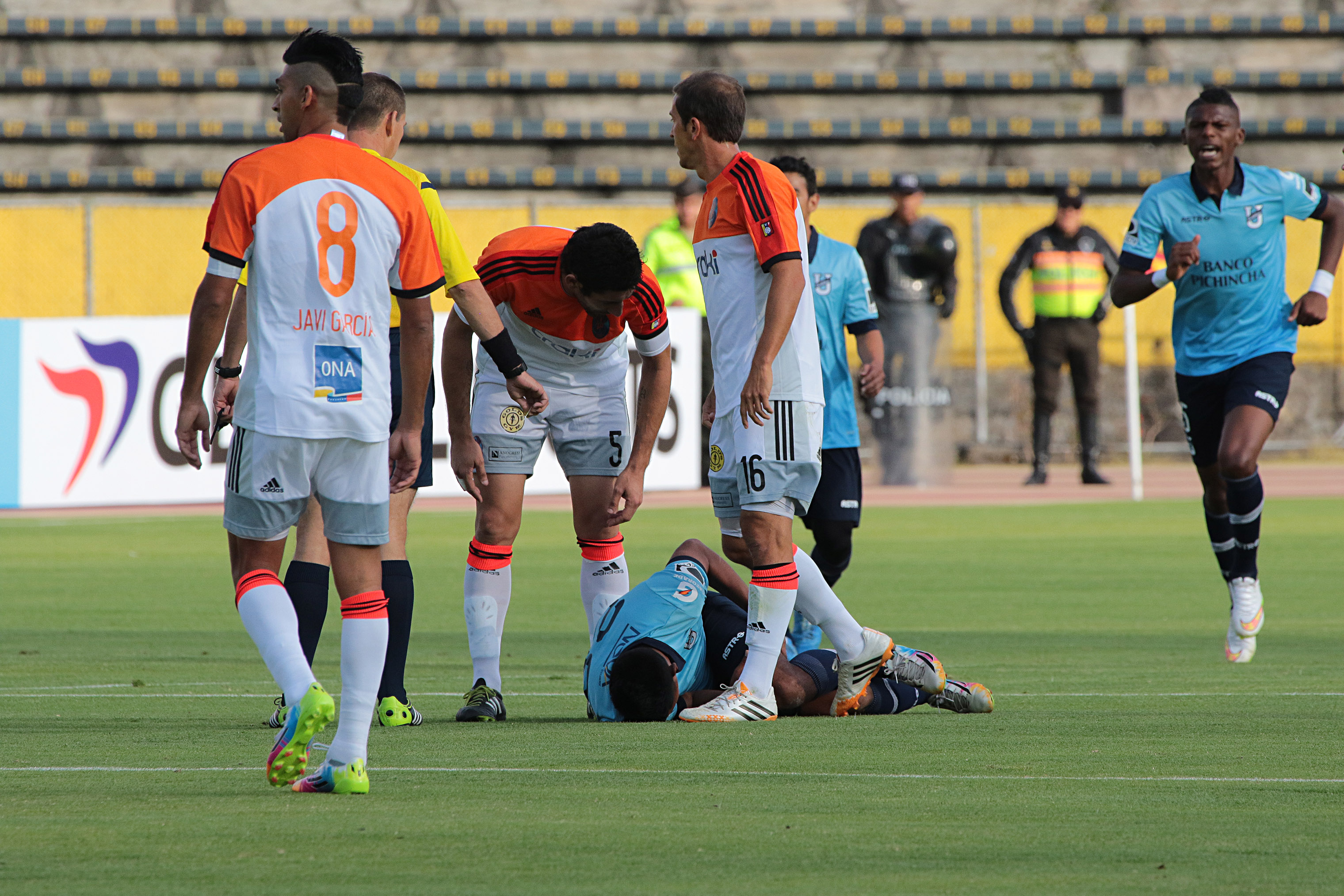 Quito, 11 Ago (Andes).- Universidad Católica se enfrentó a Deportivo La Guaira (Ven) por la copa sudamericana. Fotografías: Carlos Rodríguez/Andes.